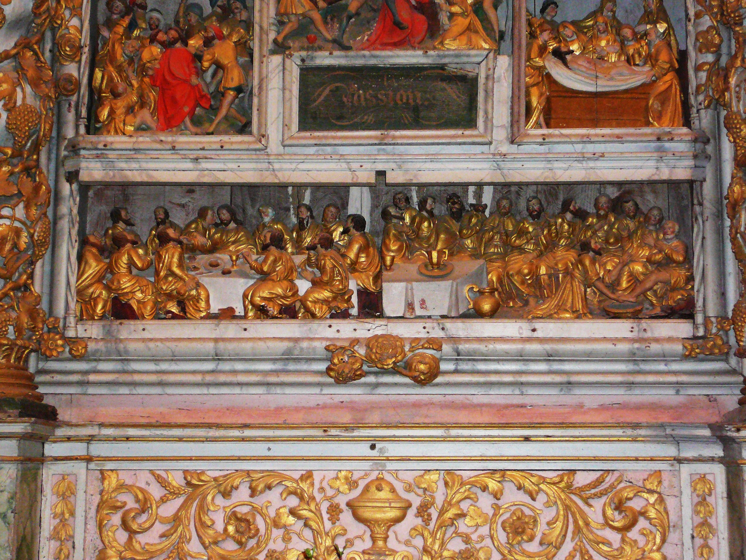 Lampaul-Guimiliau : église Notre-dame, retable de la Passion, détail de la Cène